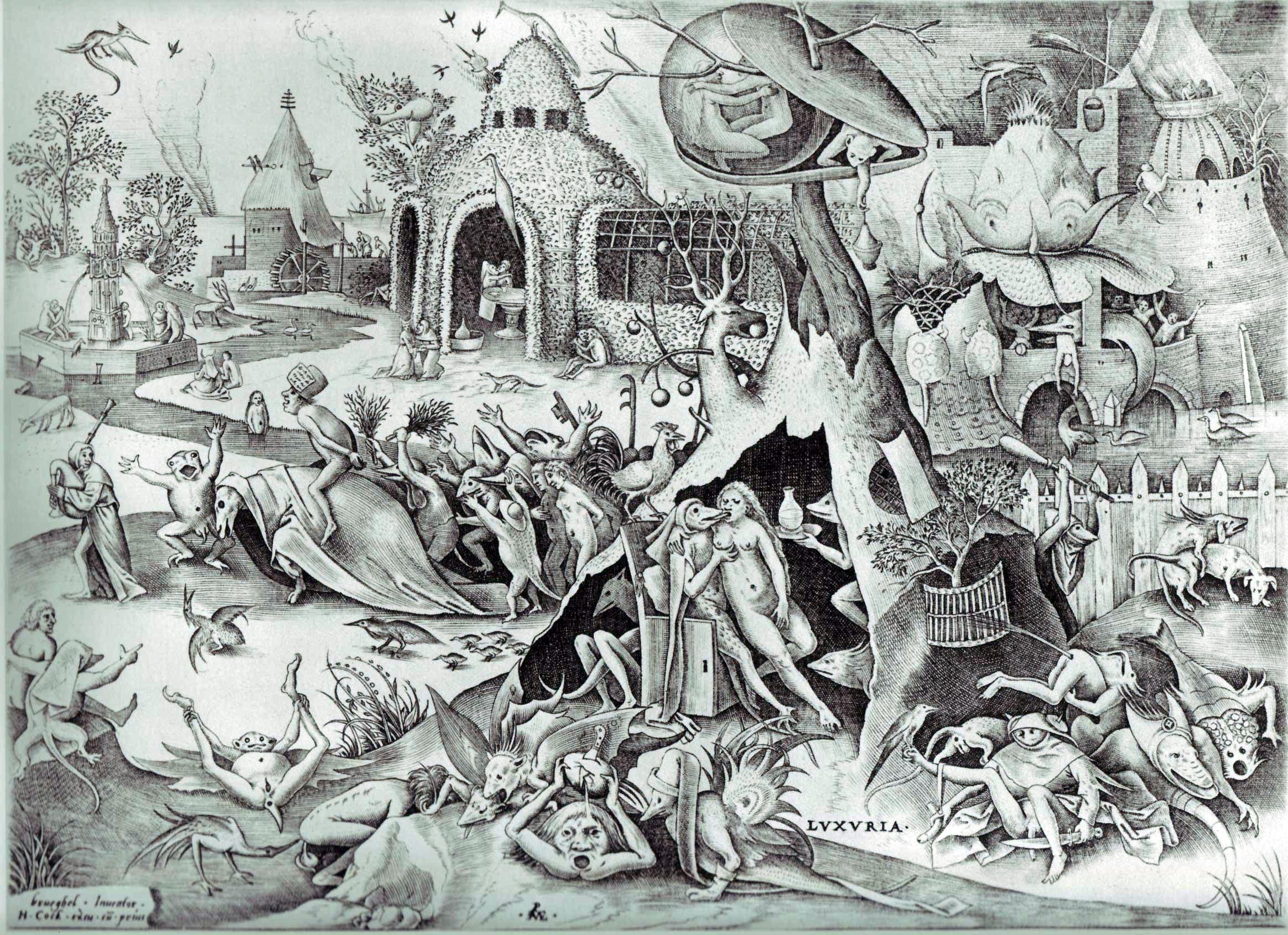 Pieter van der Heyden (after Pieter Bruegel (I)): The Seven Deadly Sins or the Seven Vices - Lechery